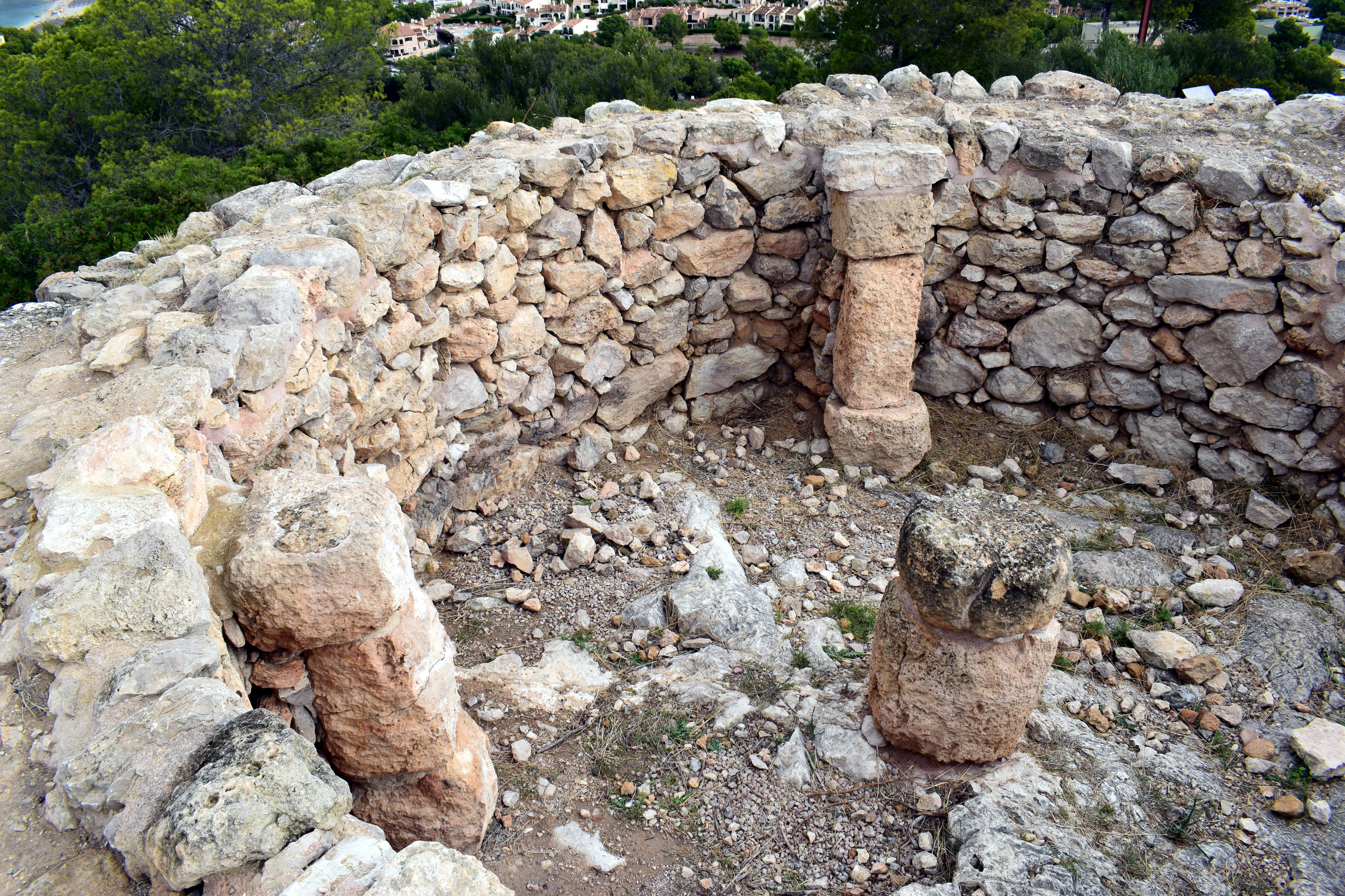 Blick in den Talayot (Turm 3) der prähistorischen Siedlung Puig de sa Morisca bei Santa Ponça, Gemeinde Calvia, Mallorca.